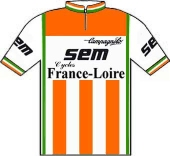 *permission : licence utilisée avec la permission du site concerné, envoyé par mail à permissions AT